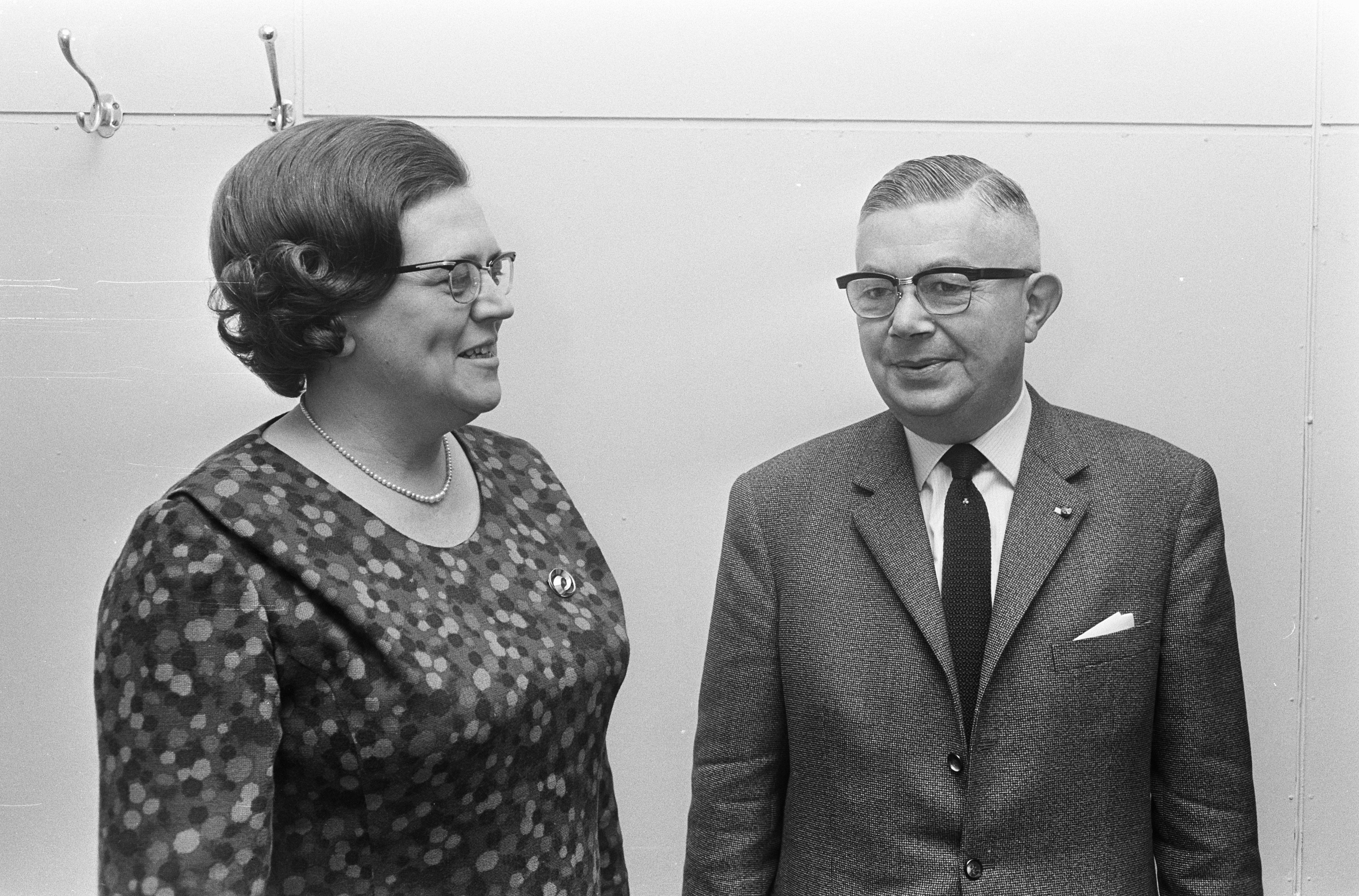 Collectie / Archief : Fotocollectie Anefo Reportage / Serie : [ onbekend ] Beschrijving : Congres over Gezinsverzorging te Utrecht; mw. M. van der Wall-Duyvendak, burgemeester van Geldermalsen, en mr. H.J. van der Poel, staatssecretaris van Cultuur, Recreatie en Maatschappelijk Werk Datum : 27 oktober 1967 Locatie : Utrecht (prov), Utrecht (stad) Trefwoorden : burgemeesters, congressen, ministers, sociaal beleid Persoonsnaam : Poel, H.J. van der, Wall-Duyvendak, Mia van der Fotograaf : Koch, Eric / Anefo Auteursrechthebbende : Nationaal Archief Materiaalsoort : Negatief (zwart/wit) Nummer archiefinventaris : bekijk toegang 2.24.01.05 Bestanddeelnummer : 920-8159